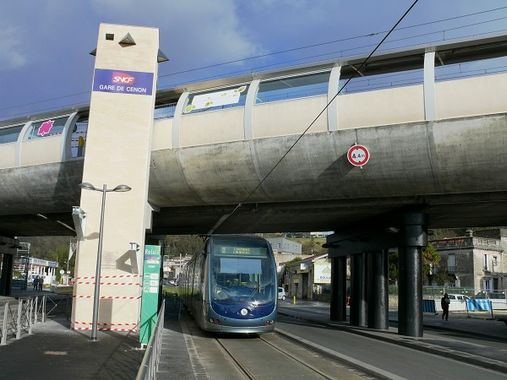 Gare de Cenon et Tram